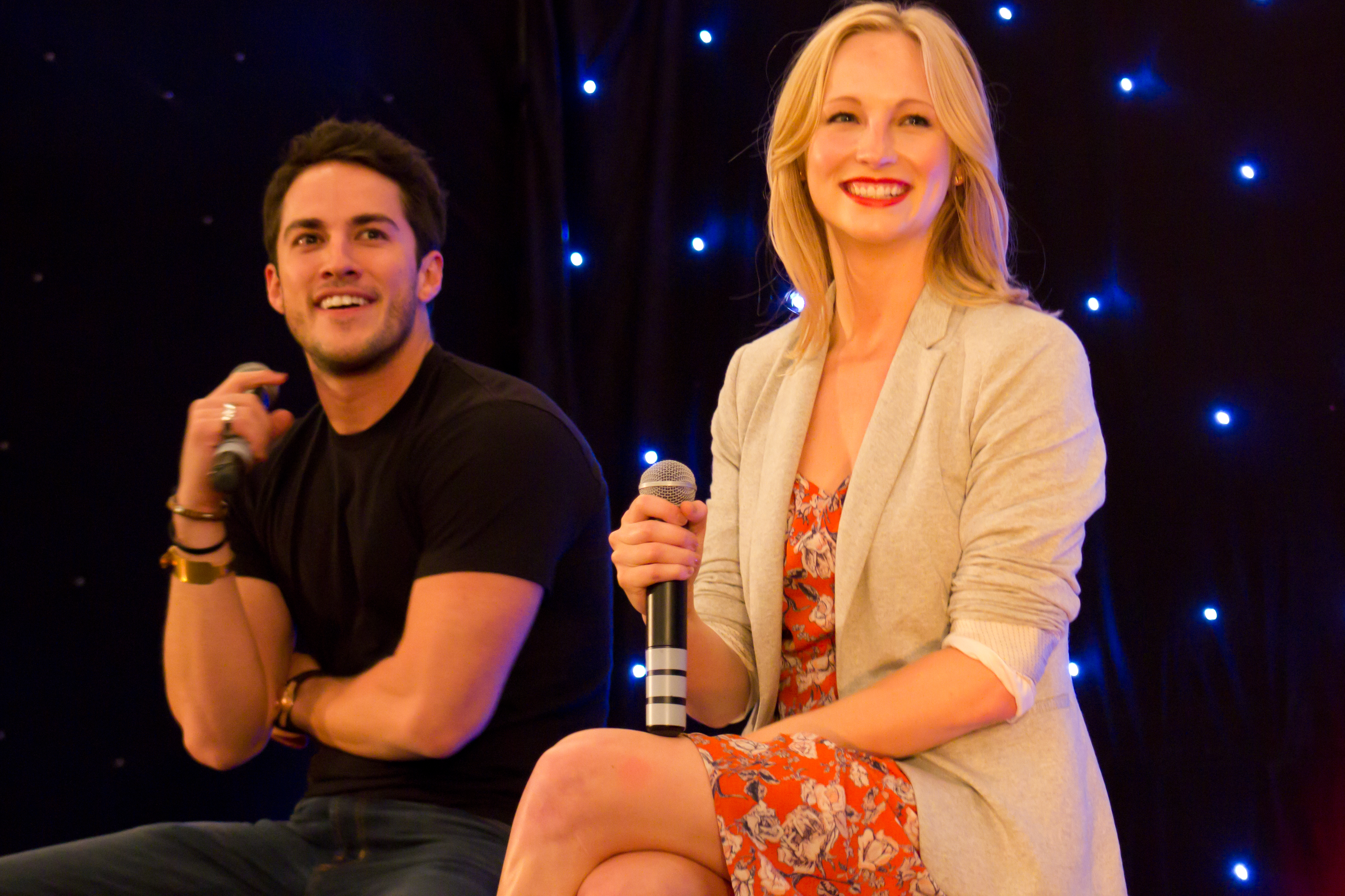 Michael Trevino & Candice Accola